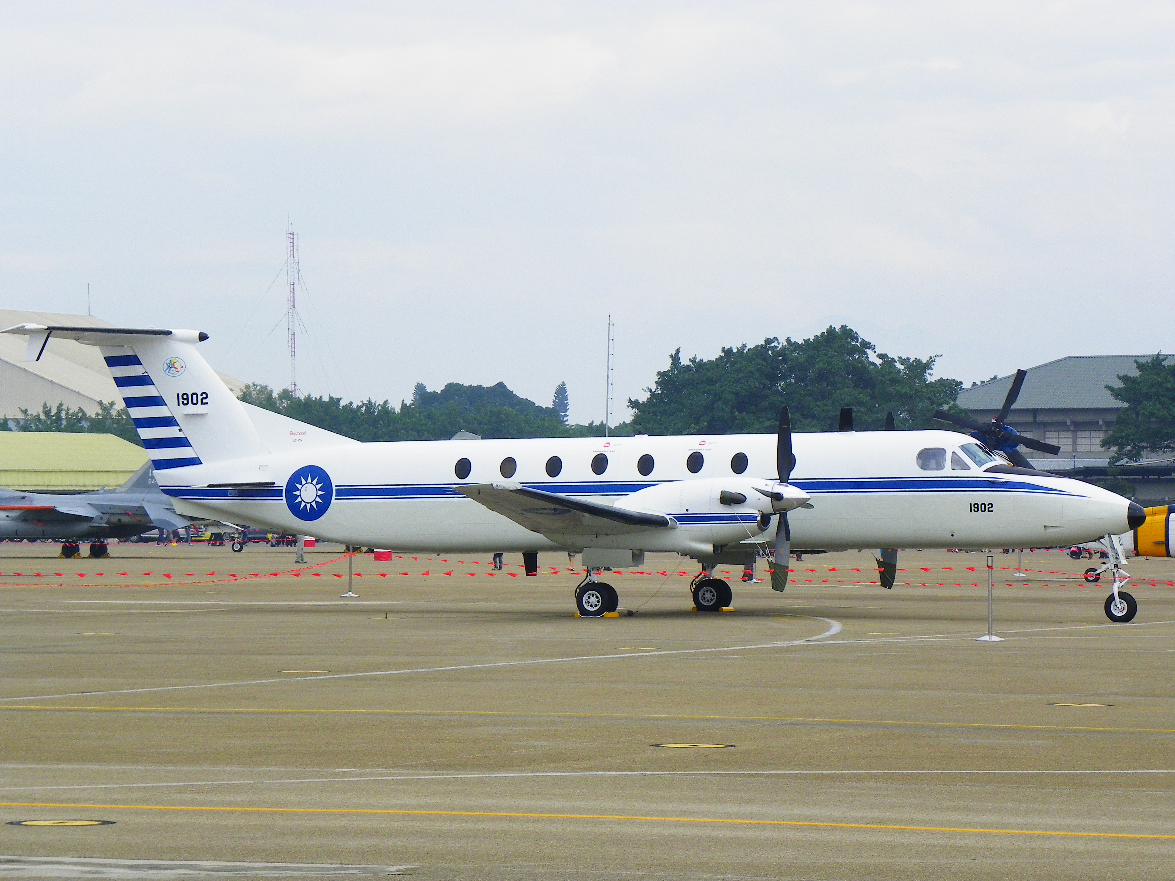 2011年空軍清泉崗基地營區開放活動，展示之畢琪1900C行政專機右側面。